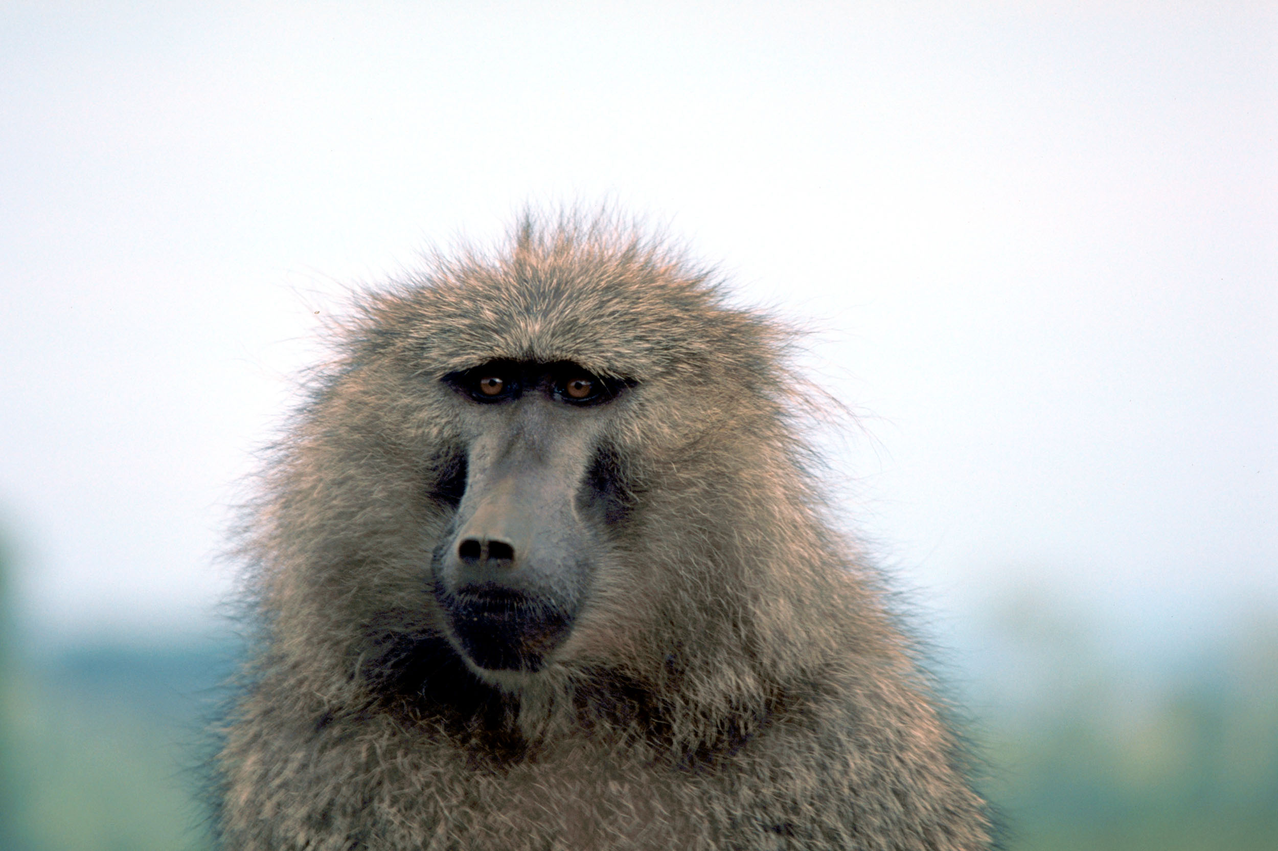 Papio anubis (olive or anubis baboon)